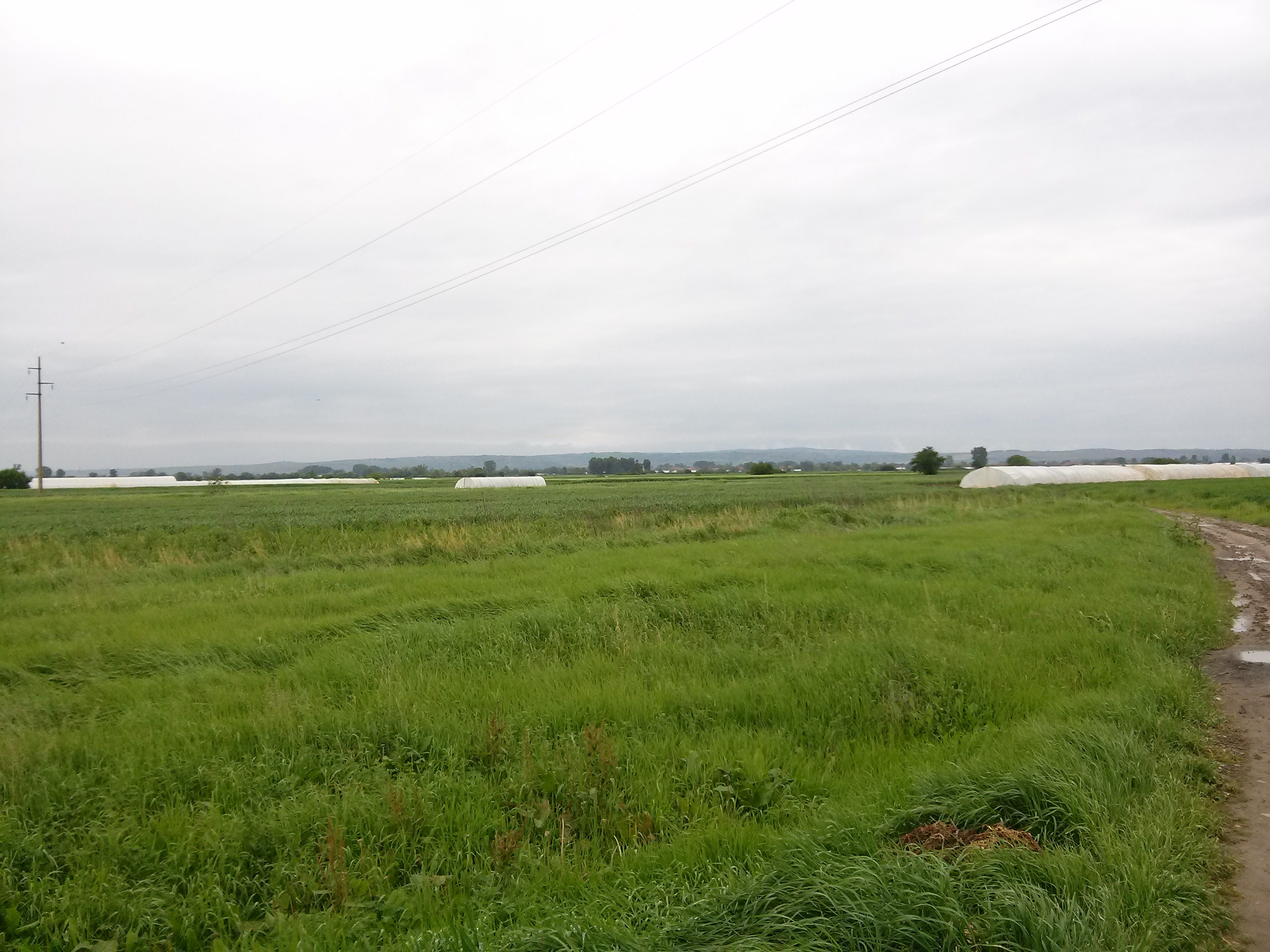 Srpski (latinica): Lokalitet Kulište u Kumarevu, mesto na kome se nekad nalazila kula jednog od gosporada Kumareva